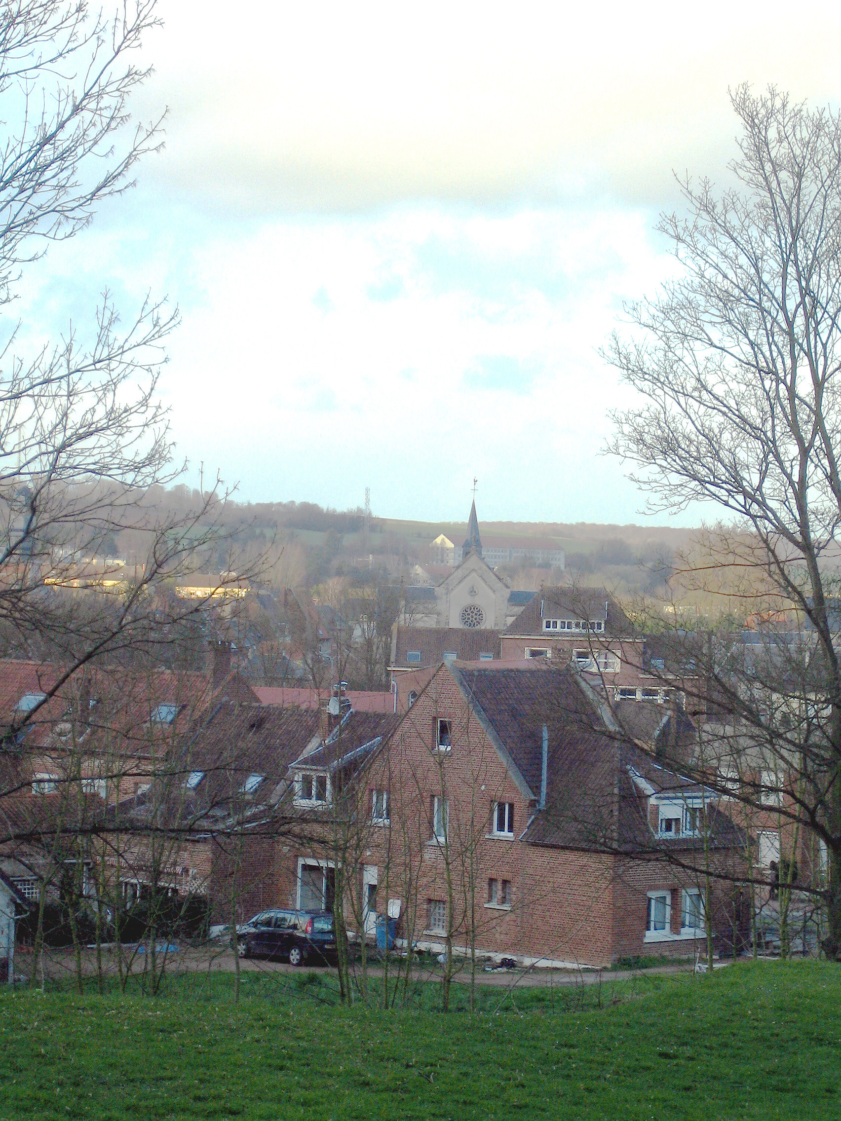 Doullens (Somme, France) - Panorama partiel de la ville, avec son église. Vue vers le Nord, depuis l'entrée de la Citadelle, au bord de la Route Nationale 25, à gauche (en provenance d'Amiens).